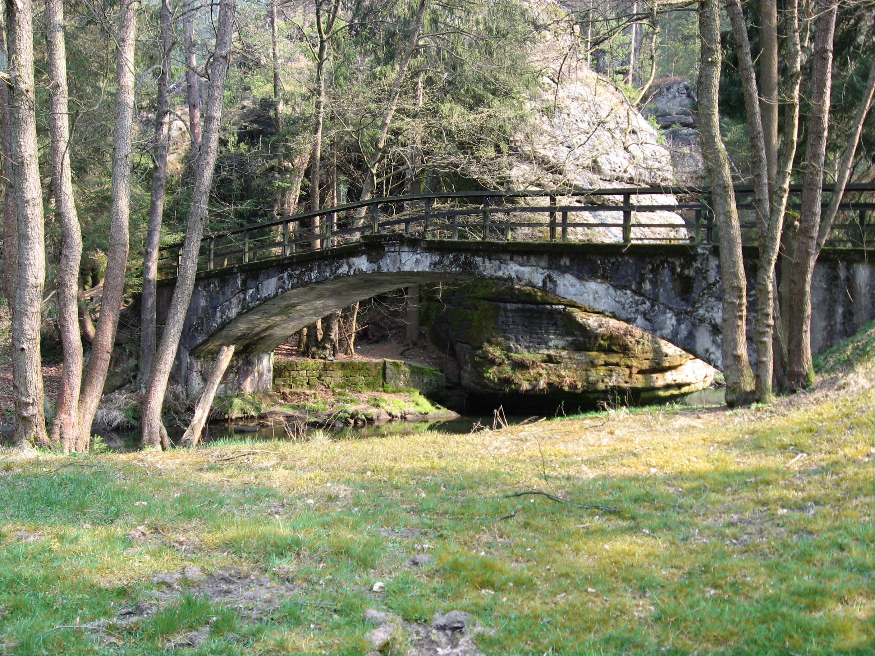 Kamenice Stahlbetonbrücke nahe der Grundmühle